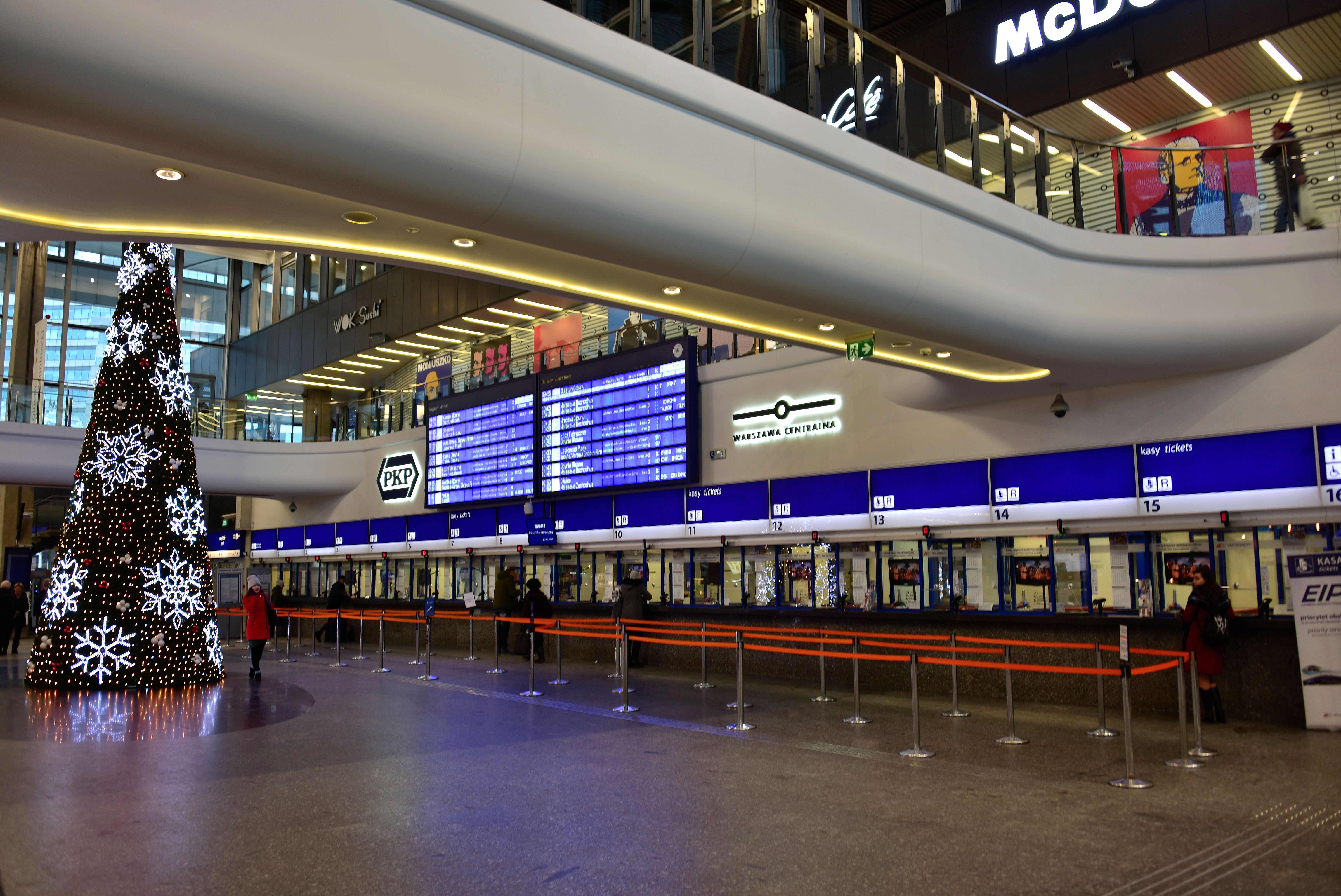 Dworzec Centralny w Warszawie